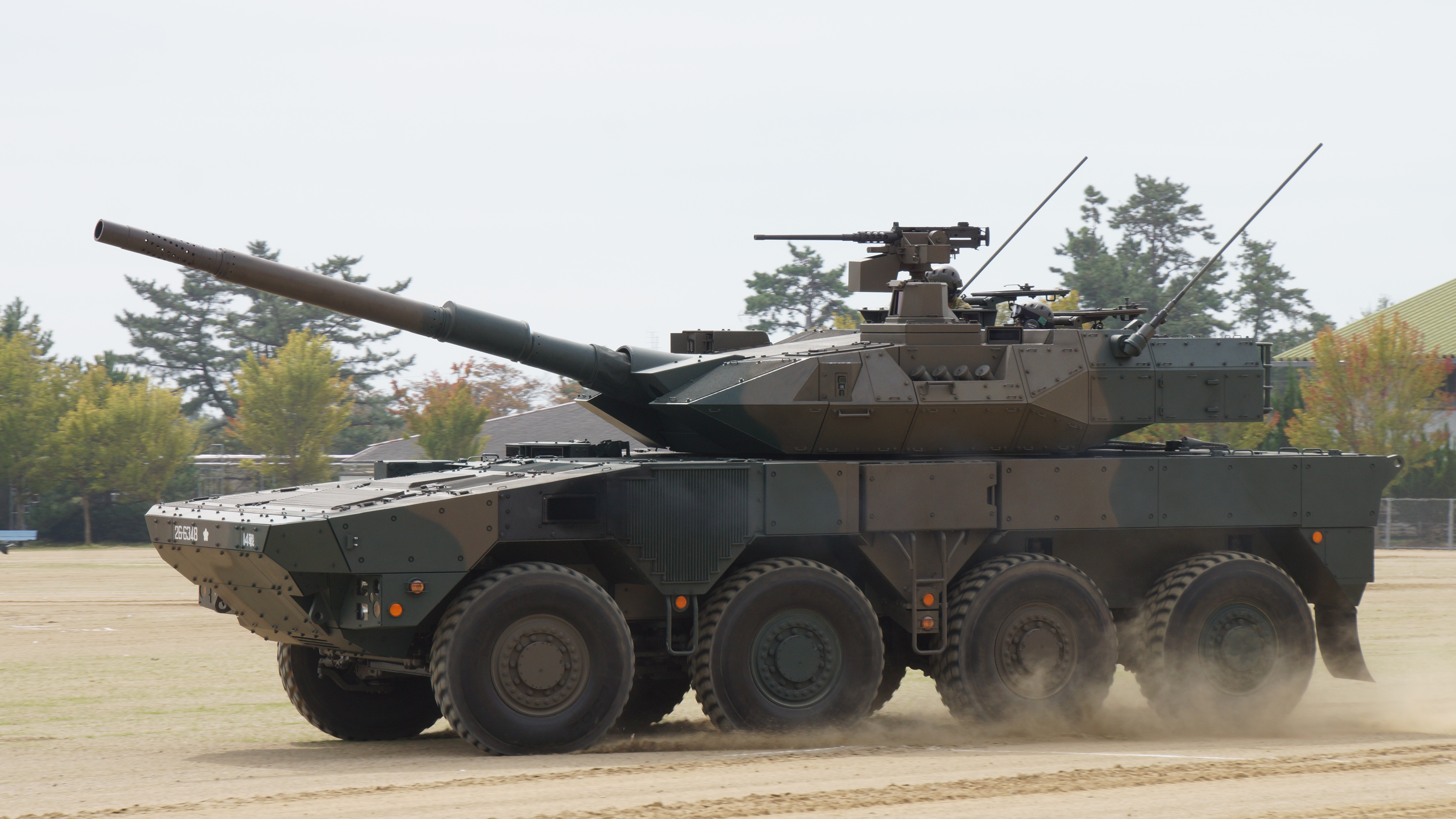 陸上自衛隊 16式機動戦闘車（26-6348号車） 左前部。2017年10月1日 日本原駐屯地にて。